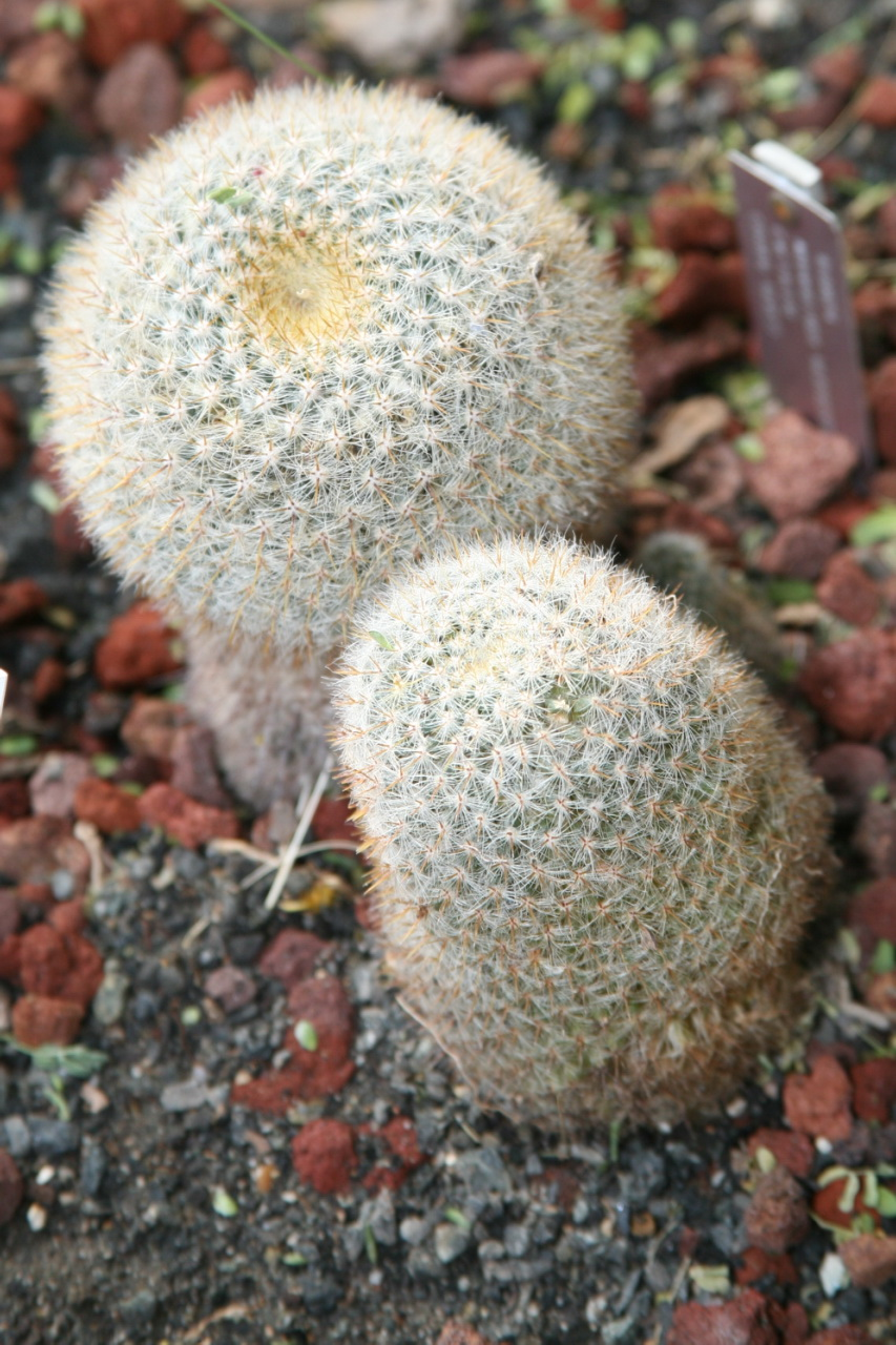 Mammillaria meuhlenpfordtii